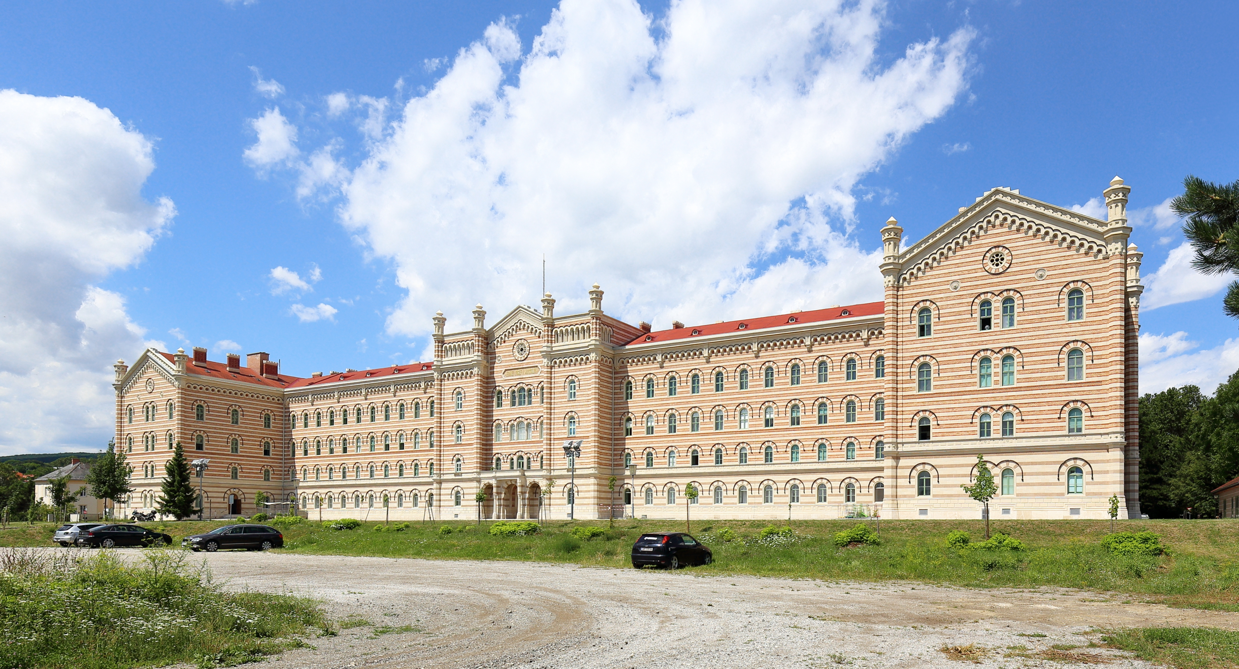 Südostansicht des Hauptgebäudes der Martinkaserne in der burgenländischen Landeshauptstaft Eisenstadt.Der Komplex wurde unter der Bauleitung von Sigismund von Malinowski von 1853 bis 1858 als k.k. Kadetteninstitut am Südhang des Leithagebirges errichtet. Das Hauptgebäude ist ein langgestreckter, symmetrischer dreiflügeliger Bau.Seit 1938 wird die Anlage, die 1967 nach dem Landespatron Martin benannt wurde, ausschließlich als Kaserne genutzt.